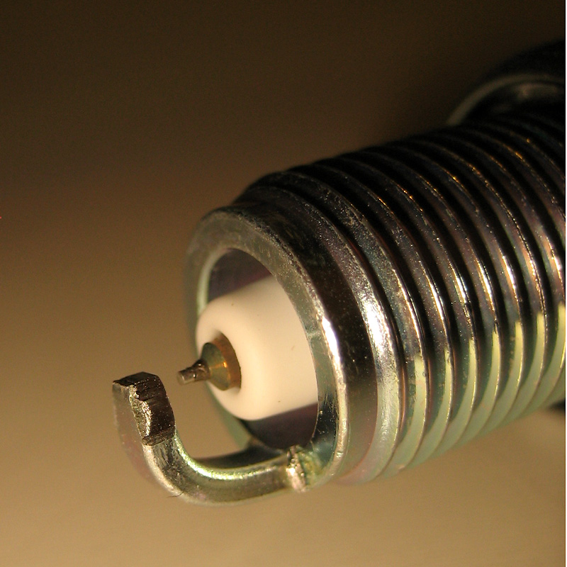 bougie d'allumage